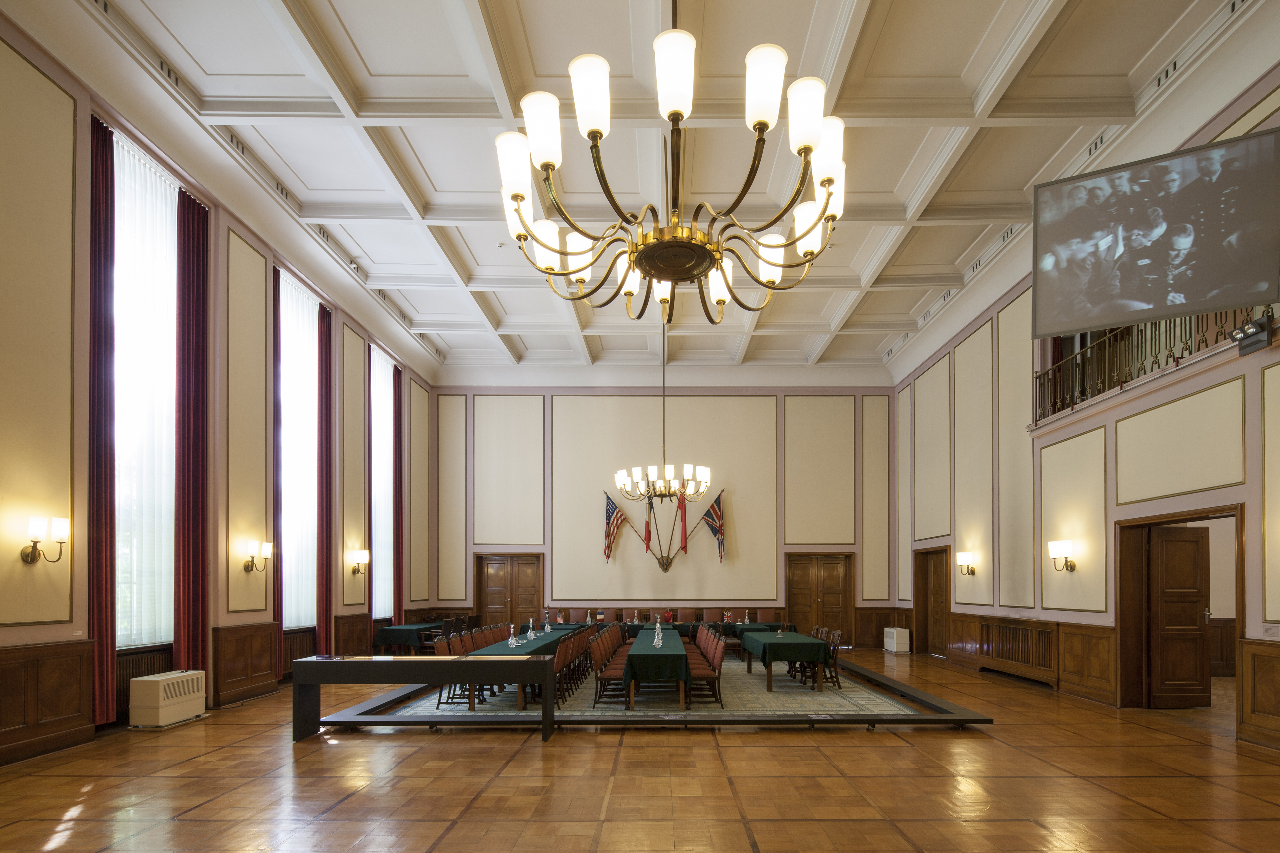 Ansicht des historischen Kapitulationssaals